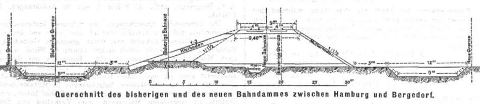 Technische Schnittzeichnung des Billwerder Bahndamms nach: Tellkampf, H. (1887): Benutzung eines Eisenbahndammes als Niederungs-Schutzdeich, Centralblatt der Bauverwaltung Nr. 25: 242-243